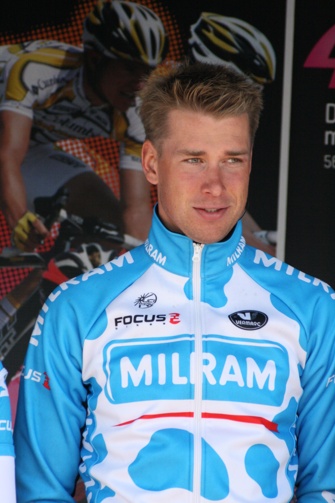 Roger Kluge, lors de la présentation des équipes des 4 jours de Dunkerque 2010